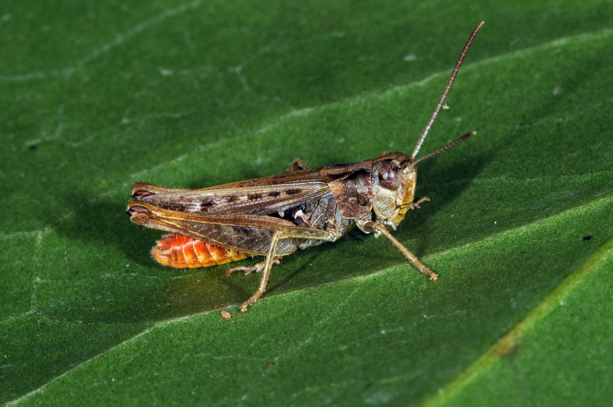 Omocestus haemorrhoidalis, Männchen, Mainzer Sand, Rheinland-Pfalz, Deutschland